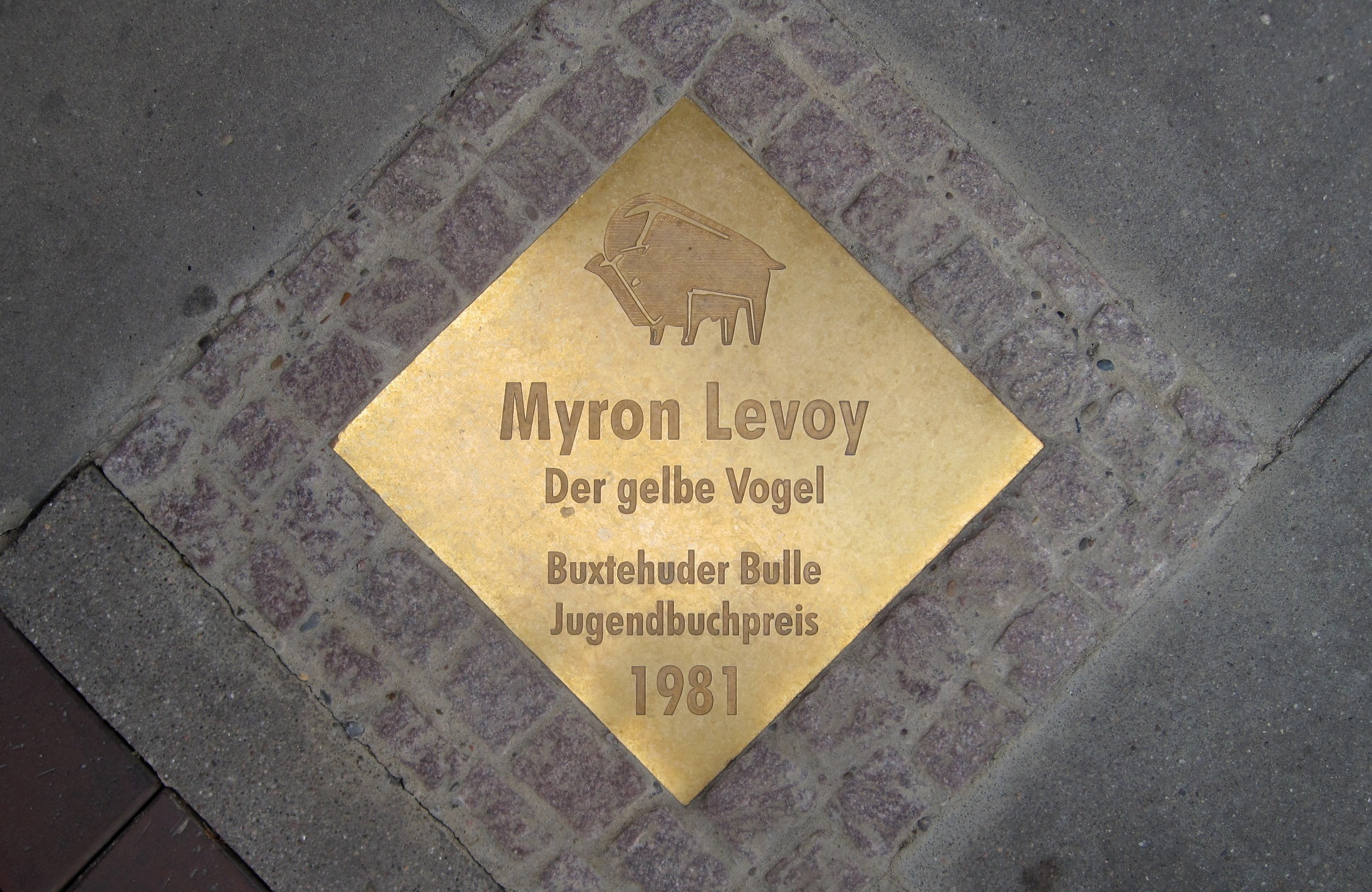 Messingplatte in der Buxtehuder Bahnhofstraße für den Preisträger 1981 des Buxtehuder Bullen, Myron Levoy.